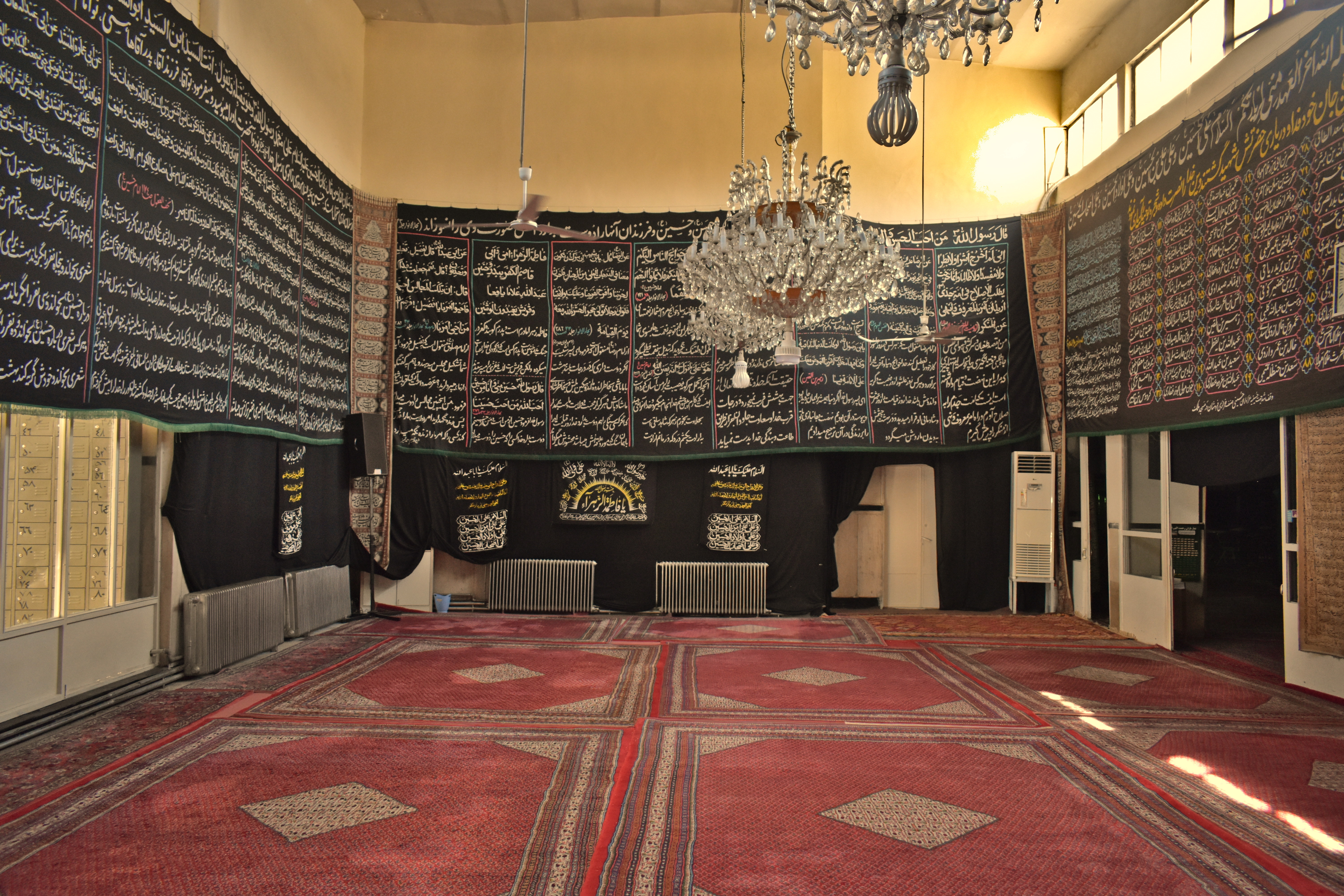 شبستان مسجد ملک التجار